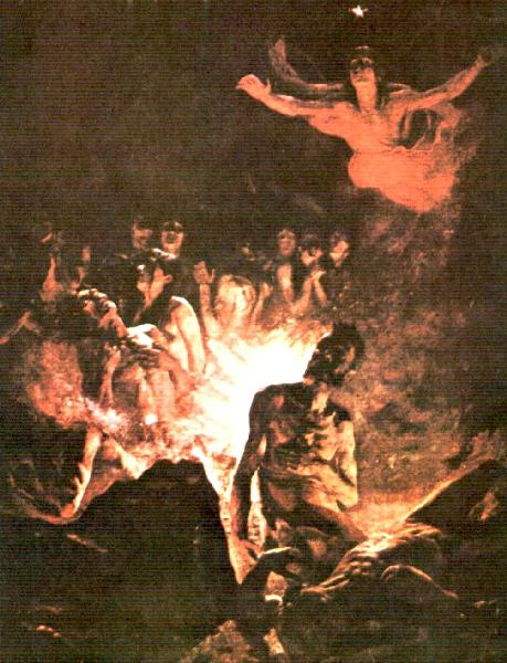 El Purgatorio (1890).